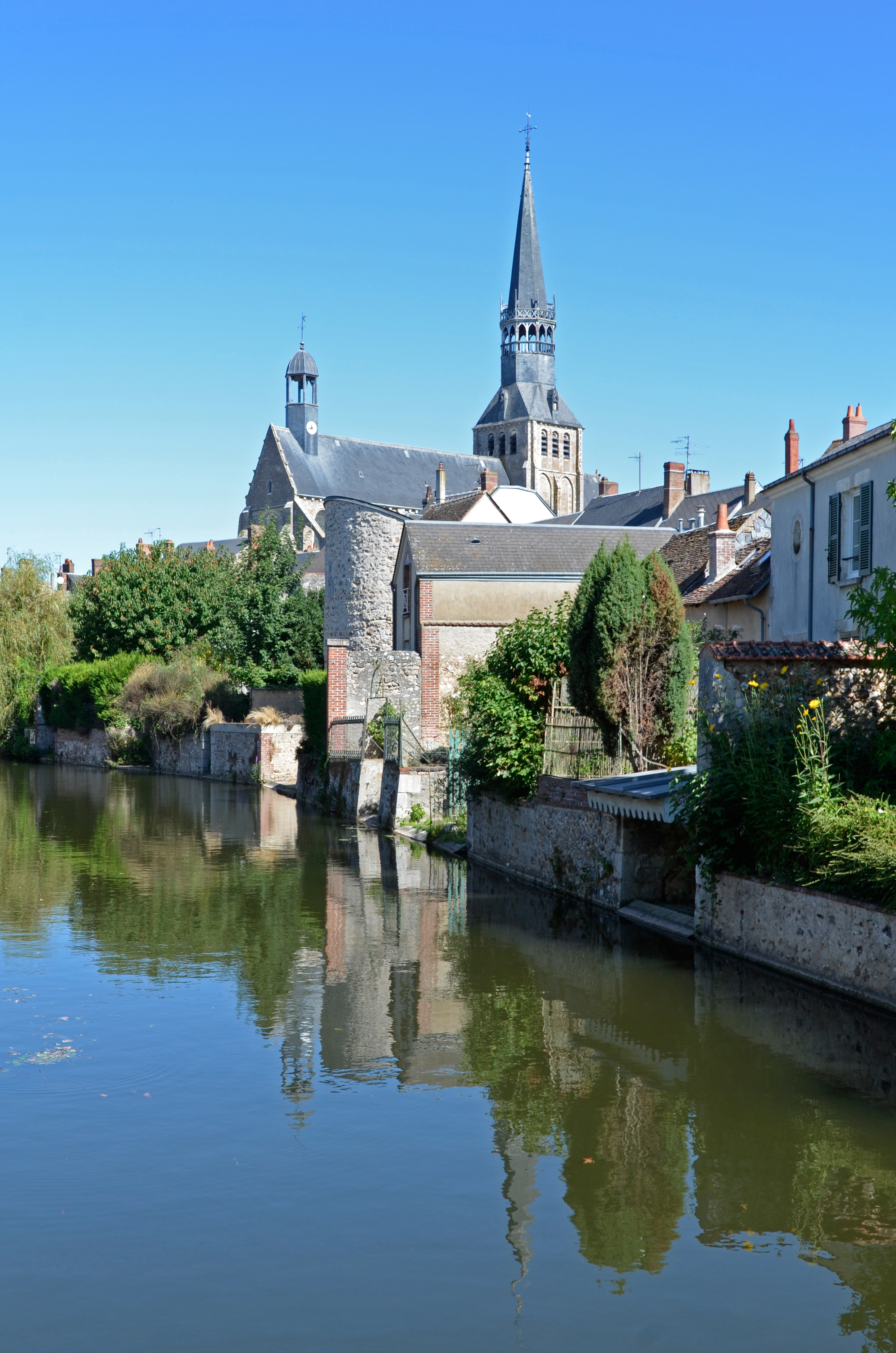 Église Notre-Dame - Bonneval, Eure-et-Loir .